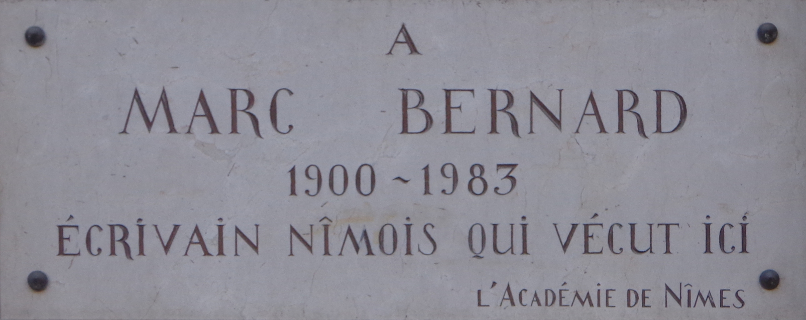 Nîmes - (Gard) - plaque Marc Bernard (1900-1983), écrivain nîmois, 12 avenue Feuchères.